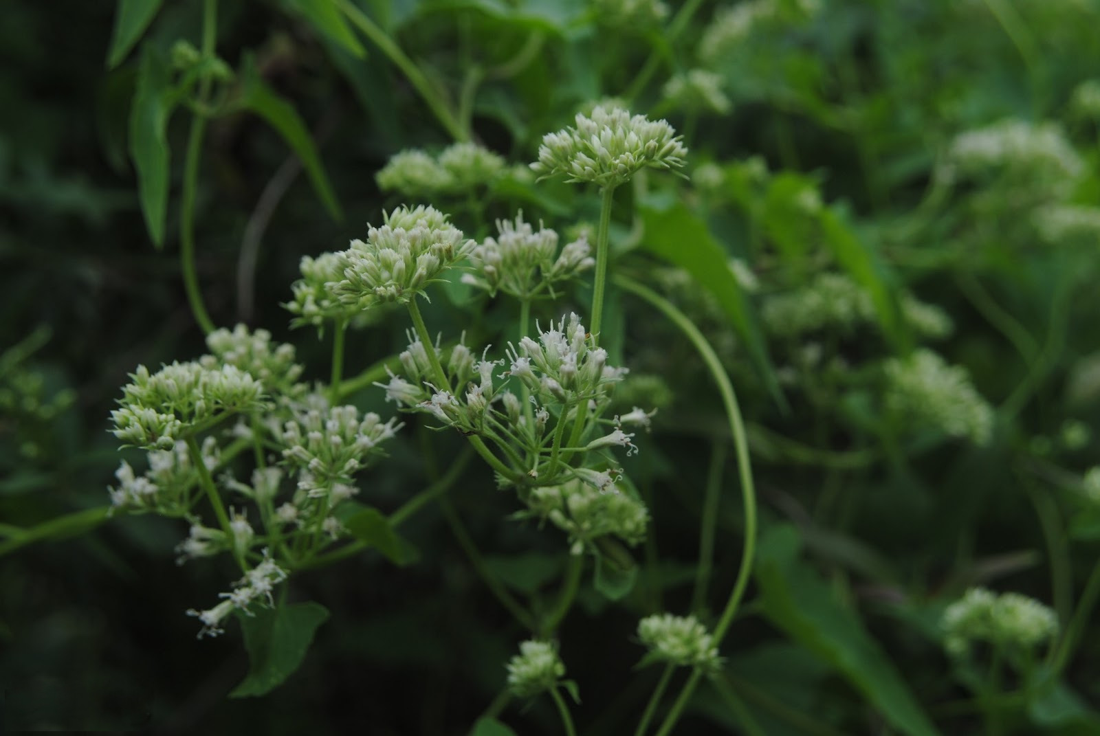 Mikania cynanchifolia. Asteraceae. Fotos tomadas sobre arbustos al margen de la Cañada de las Pajas en Palmar, departamento de Soriano, Uruguay.